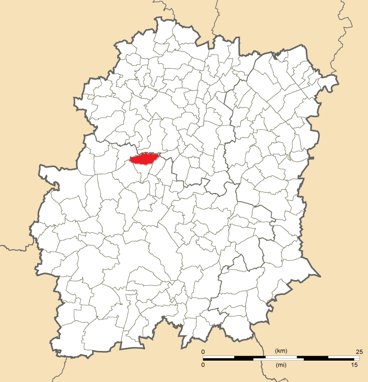 Carte de position de Breuillet en Essonne (91)